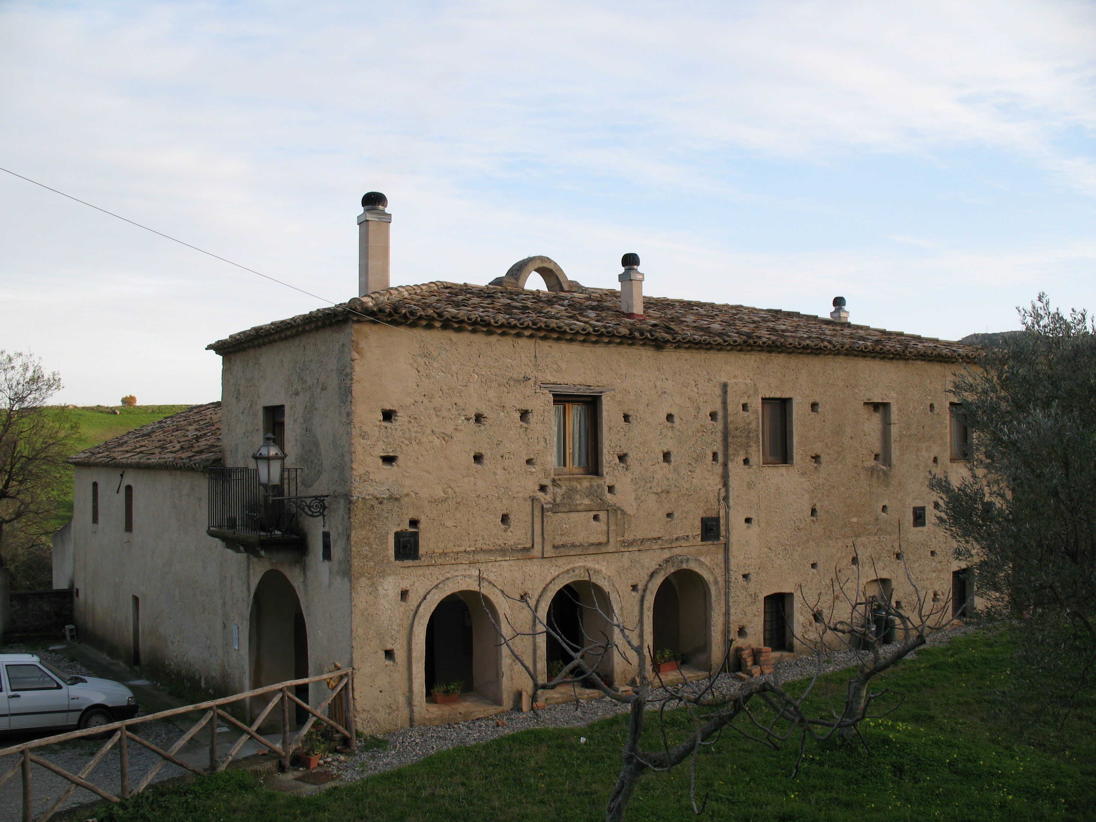 Chiesa della Madonna di Prestarona, Canolo (RC)